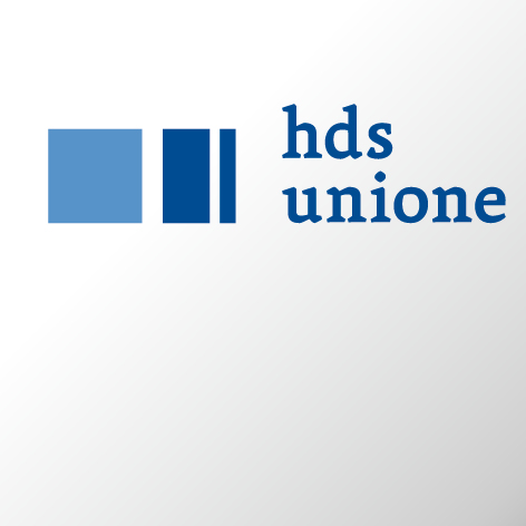 The bilingual logo of the Unione commercio turismo servizi Alto Adige